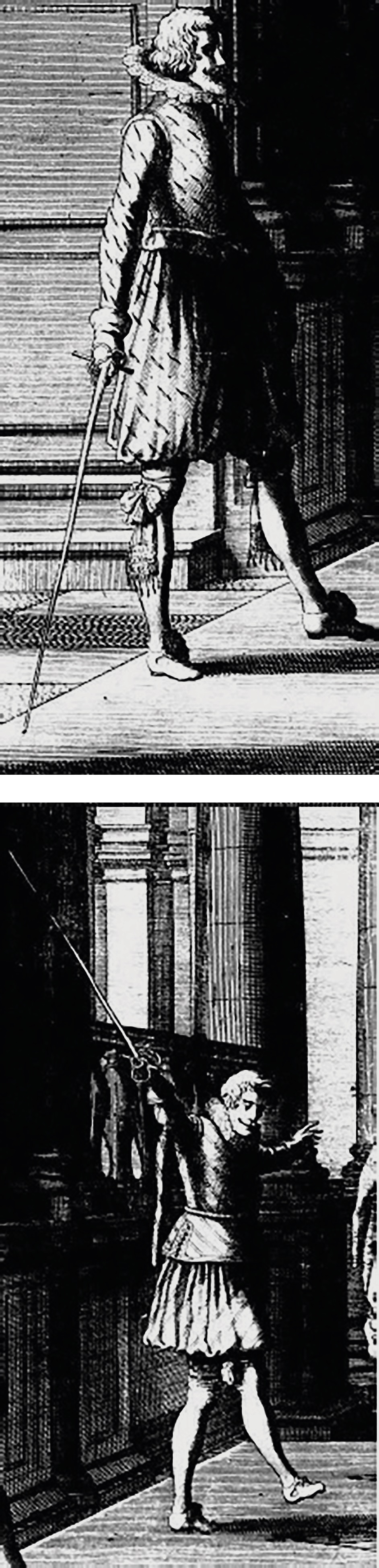 Способ представления меча оппоненту по прямой линии. Иллюстрация из трактата Жерара Тибо "Академия меча"